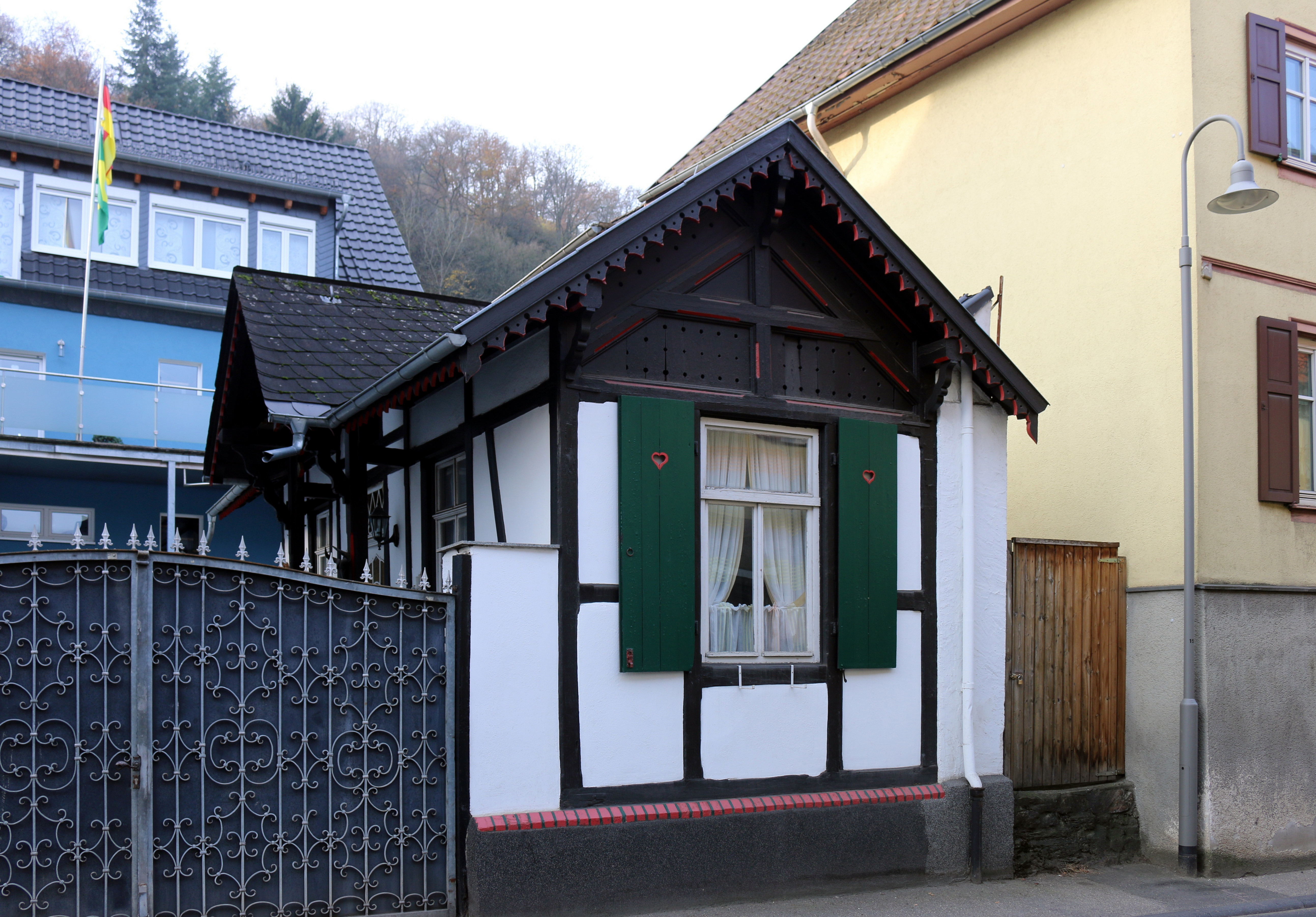 Martinsthal, Rheingau: Gebäude Hauptstraße 38. 1985 als Bahnhof der Kleinbahn Eltville-Schlangenbad eingerichtet